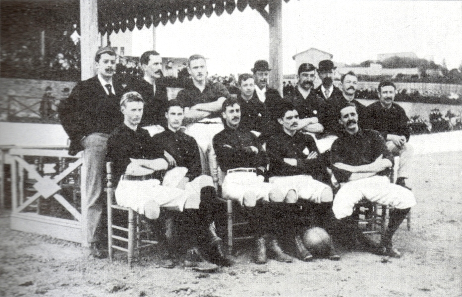 Instantània de l'històric Barcelona Foot-ball Club, un dels primers equips formats a Barcelona, integrat bàsicament per membres de la colònia britànica.